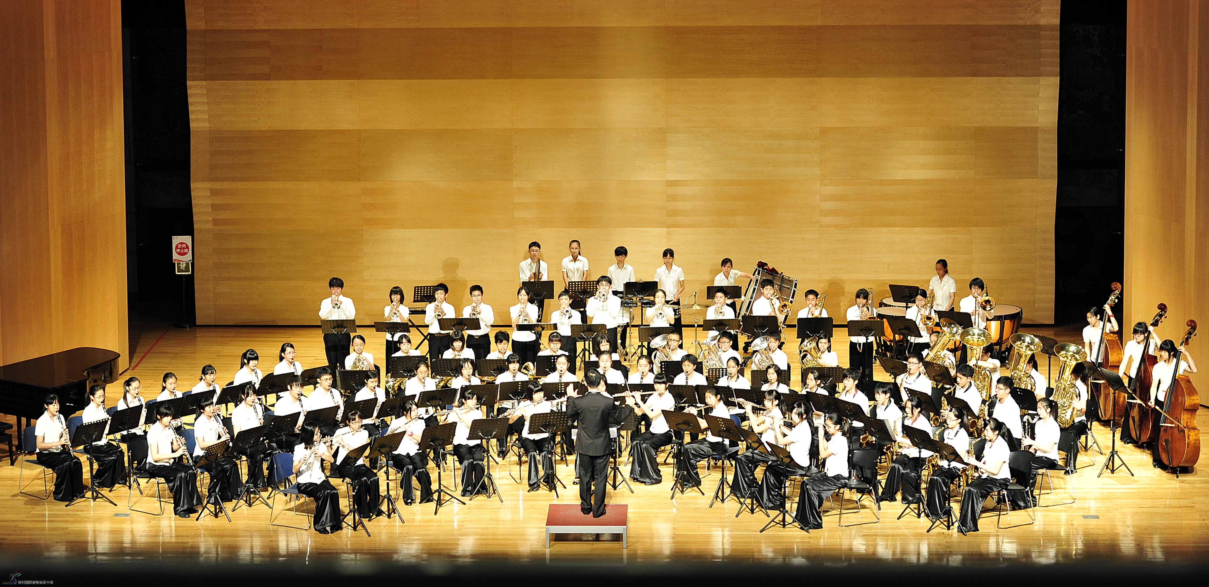 中文（台灣）: 國立南科國際實驗高級中學管樂團。